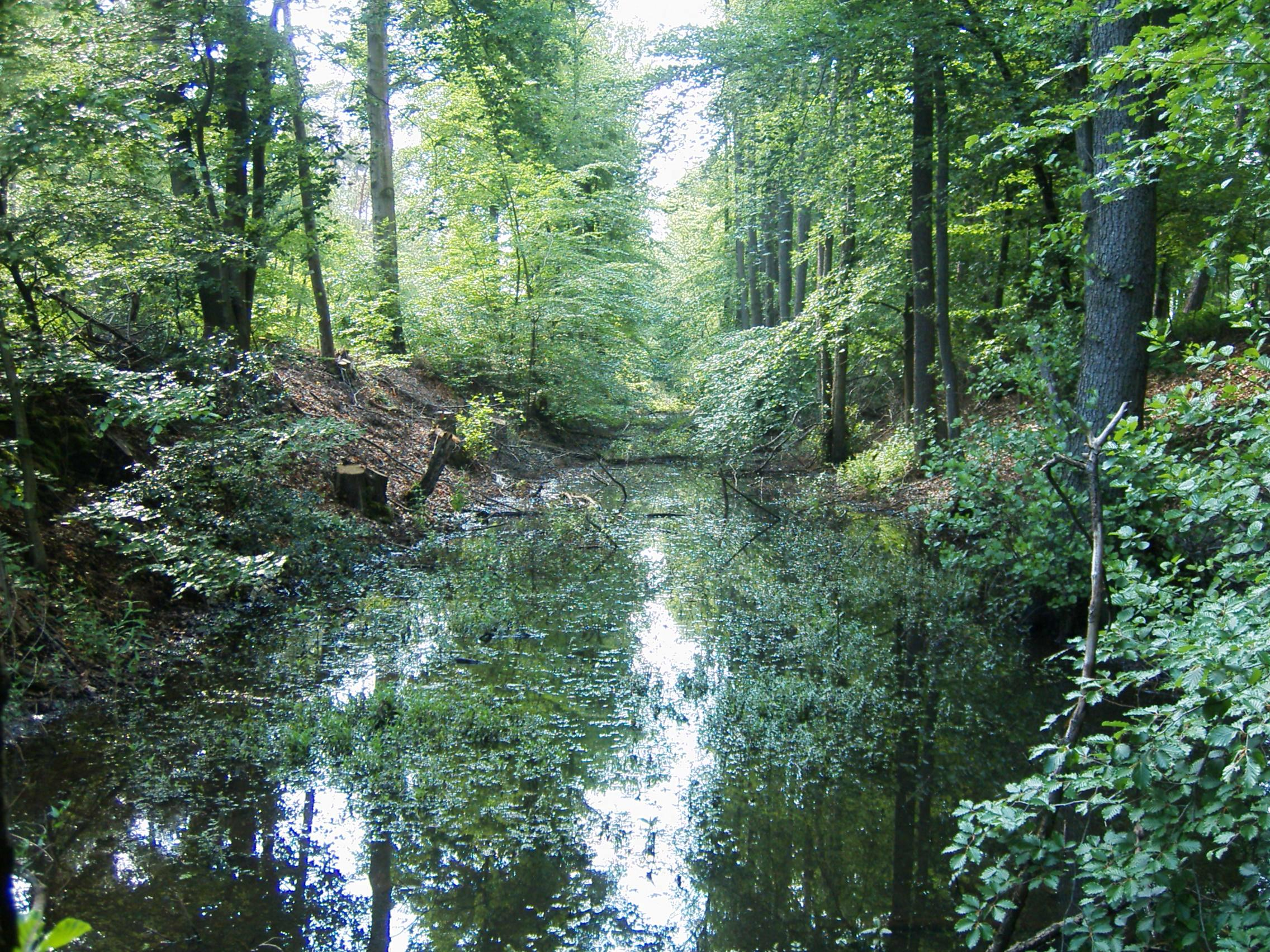 Max-Clemens-Kanal zwischen Clemenshafen und Maxhafen. Neuenkirchen (Kreis Steinfurt), ca. 500 m hinter Clemenshafen